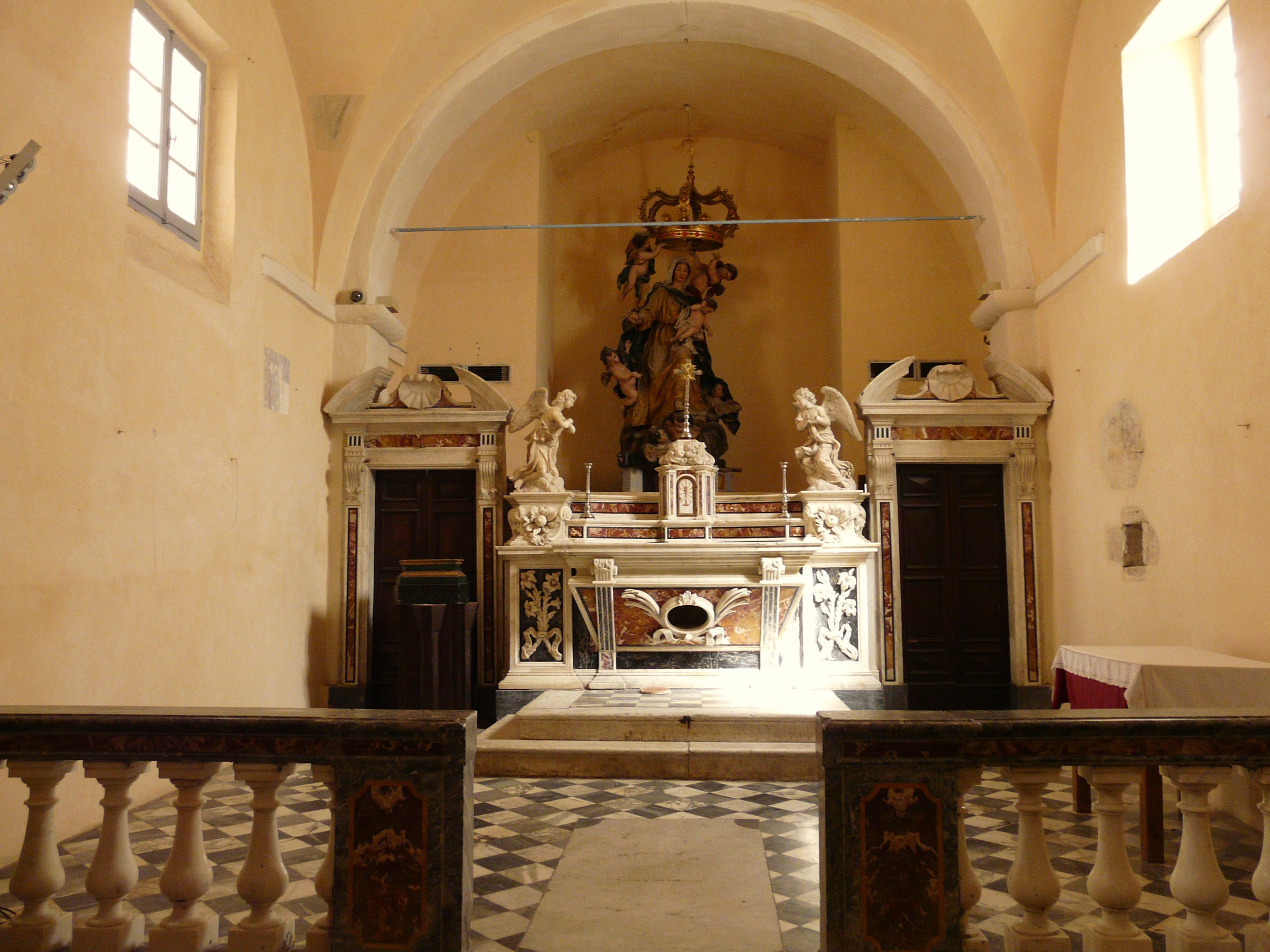 Oratorio della Compagnia Grande, cattedrale di Carrara, Toscana, Italia